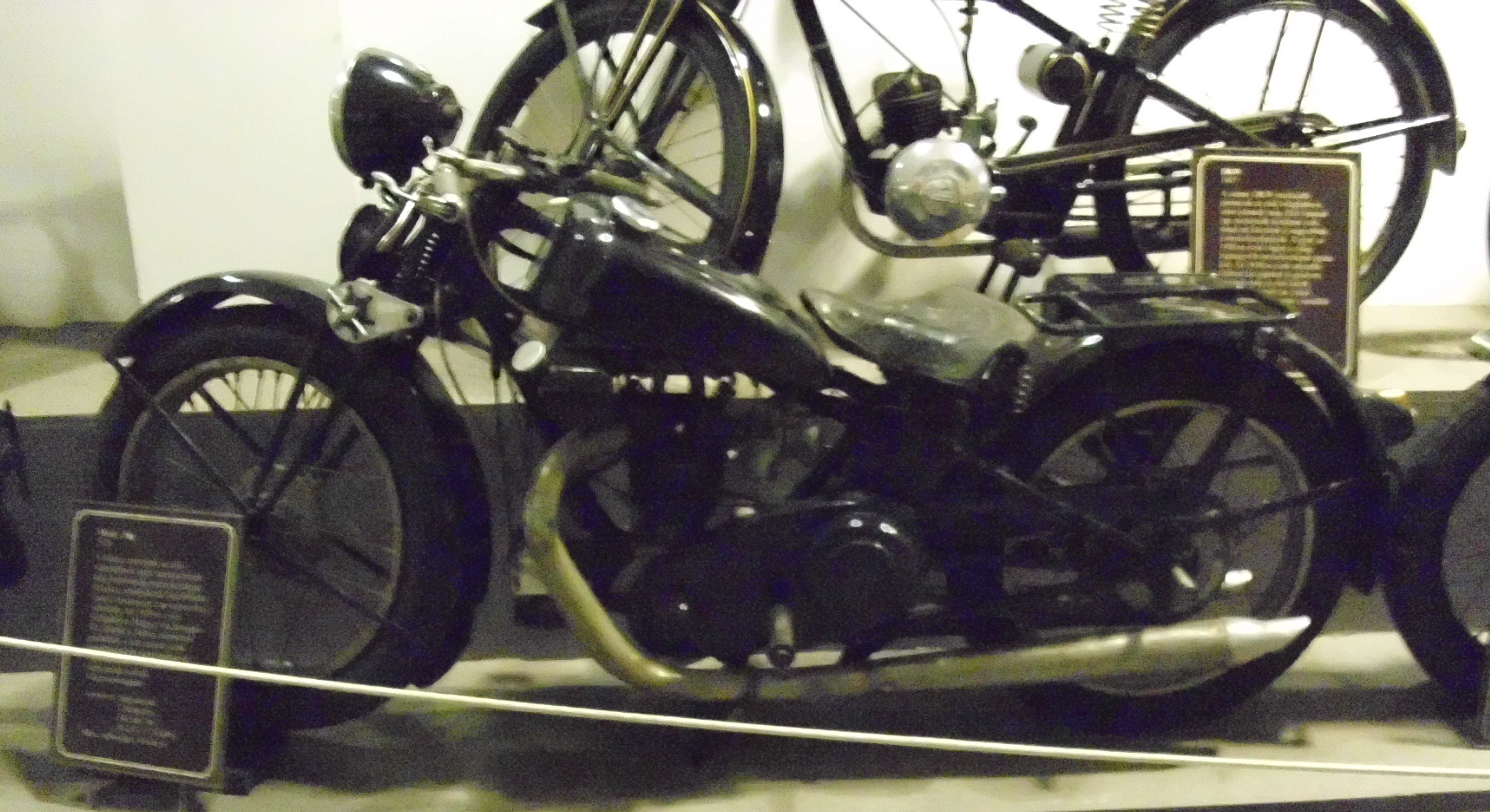 Meray-JAP Motorrad von 1928 im Transportmuseum von Budapest